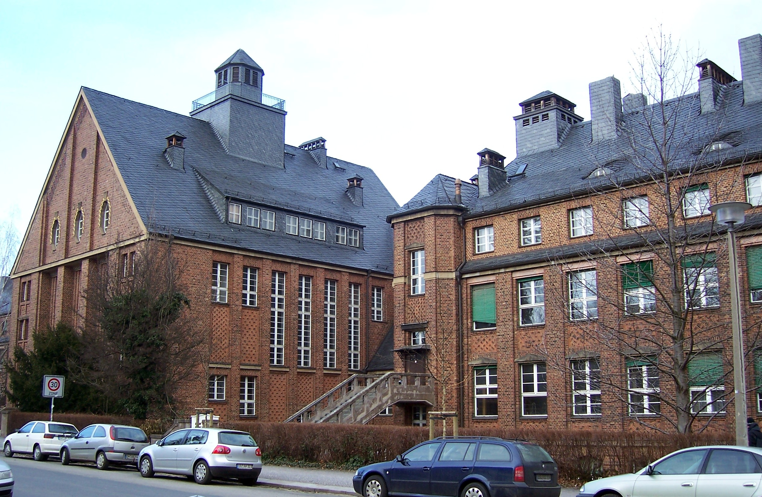 Fritz-Förster-Bau der TU Dresden